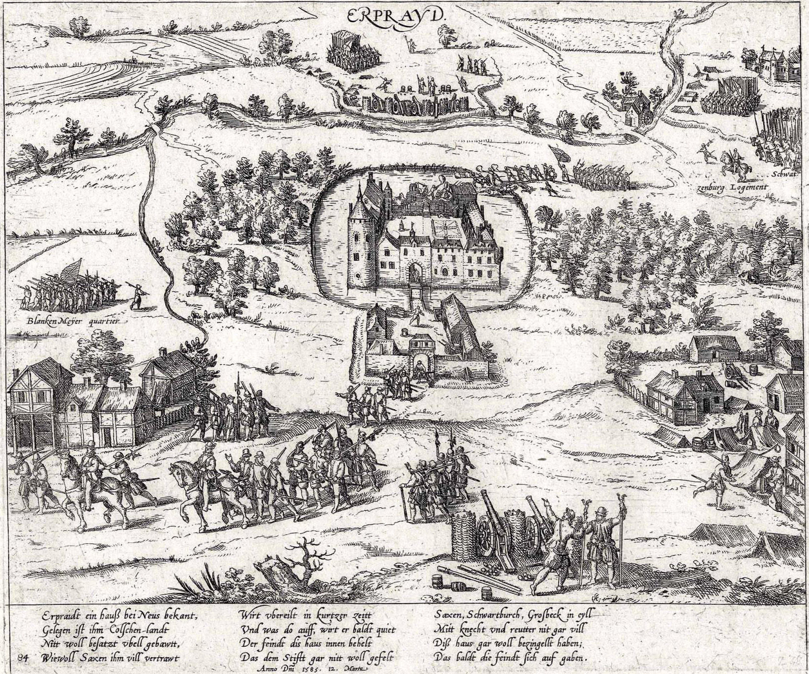 Kupferstich aus Hogenbergs Geschichtsblätter mit der Abbildung von Erprath